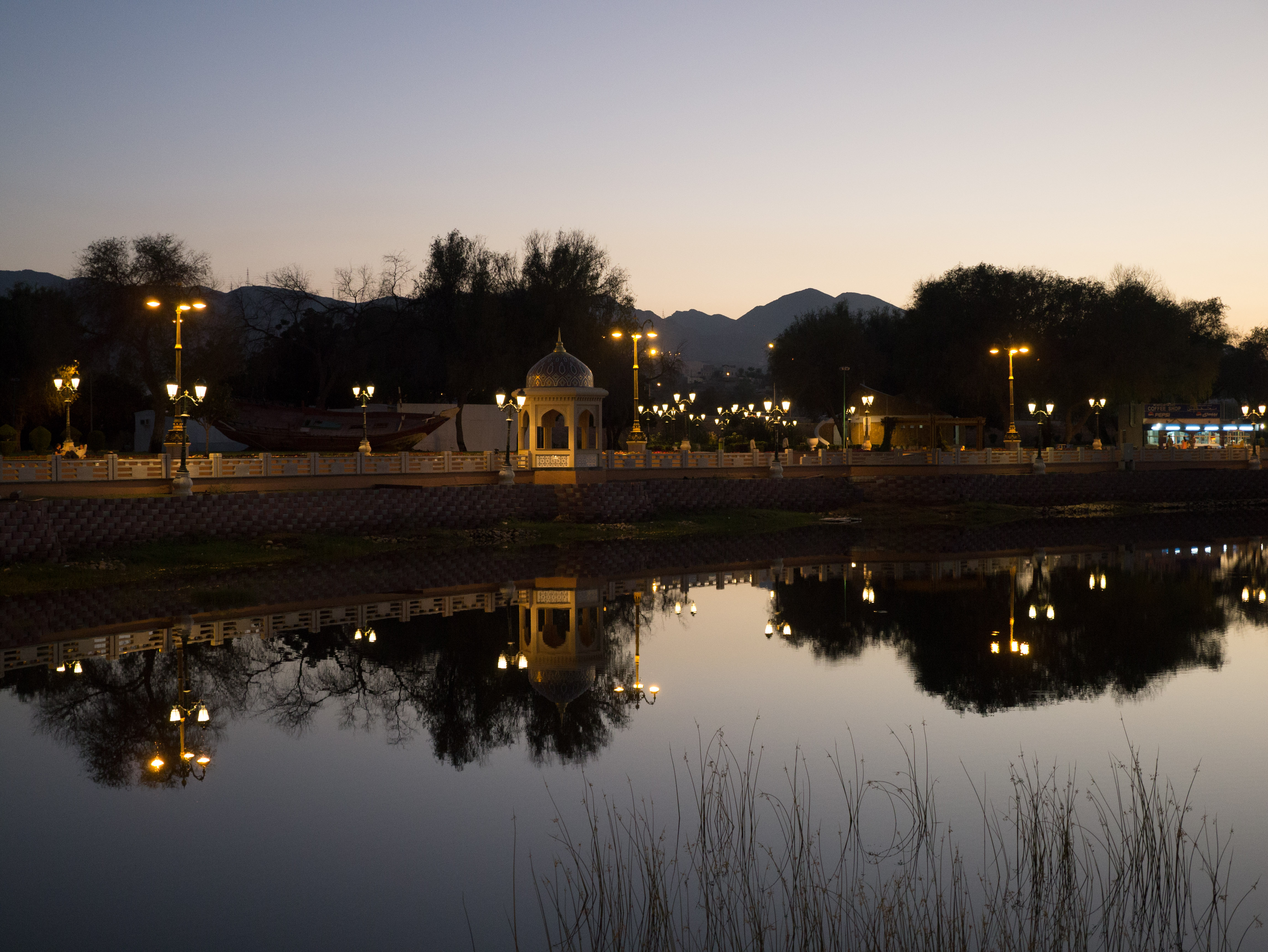 Muscat, Oman.